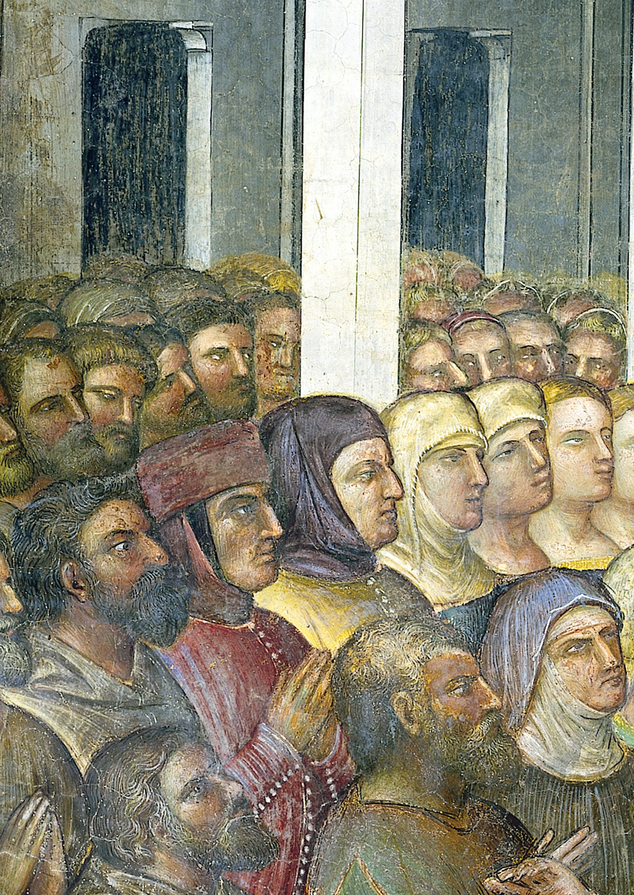 Giusto de'Menabuoi (Firenze? - Padova 1391) - Francesco Petrarca tra Francesco il Vecchio e Fina Buzzaccarini (part. da I miracoli di Cristo) - Padova, Battistero del Duomo